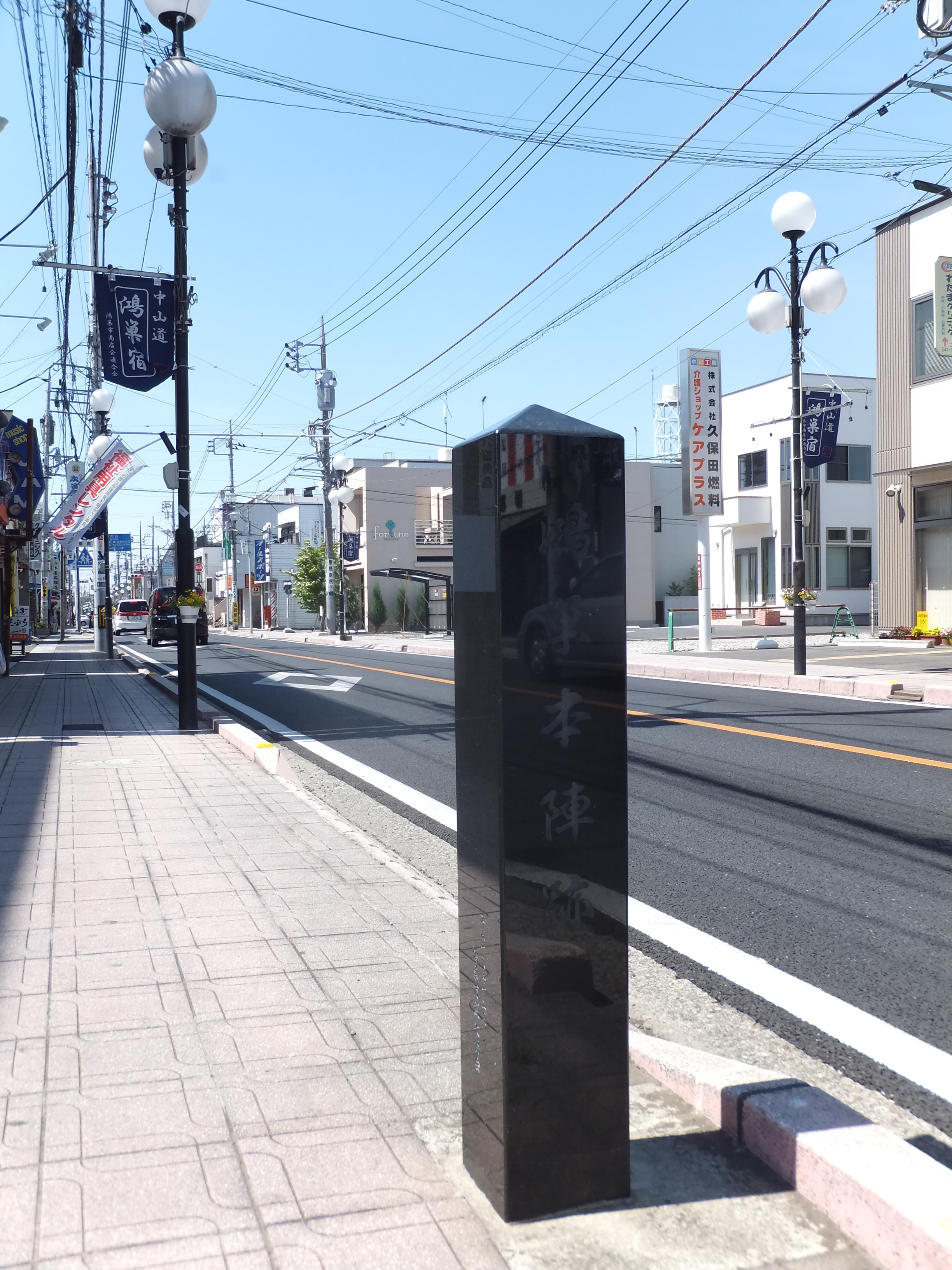 中山道鴻巣宿本陣跡